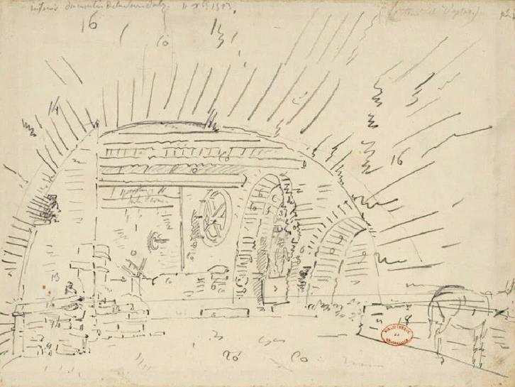 Dessin du moulin de la Foux par Amelin